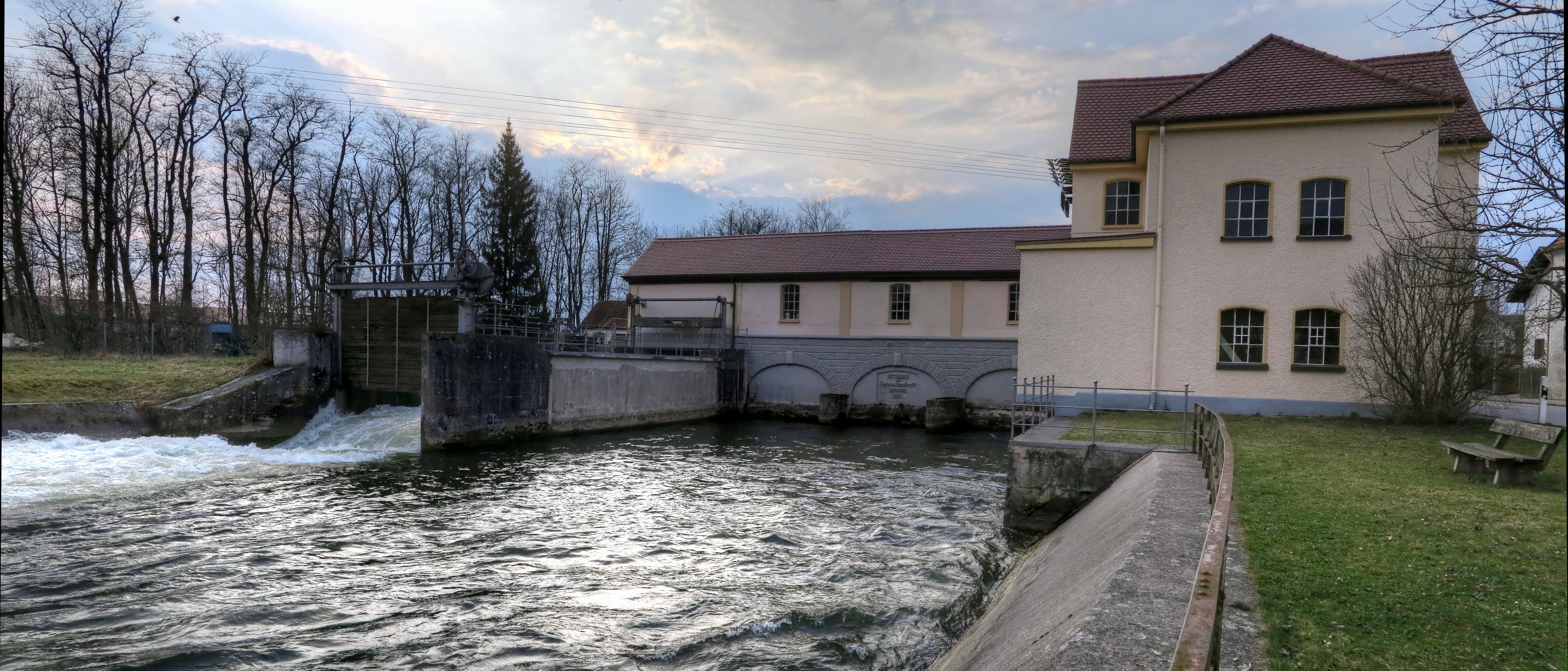 Deutschland, Bayern, Landkreis Fürstenfeldbruck, Gemeinde Schöngeising, Deutschlands ältestes Laufwasserkraftwerk an der Amper